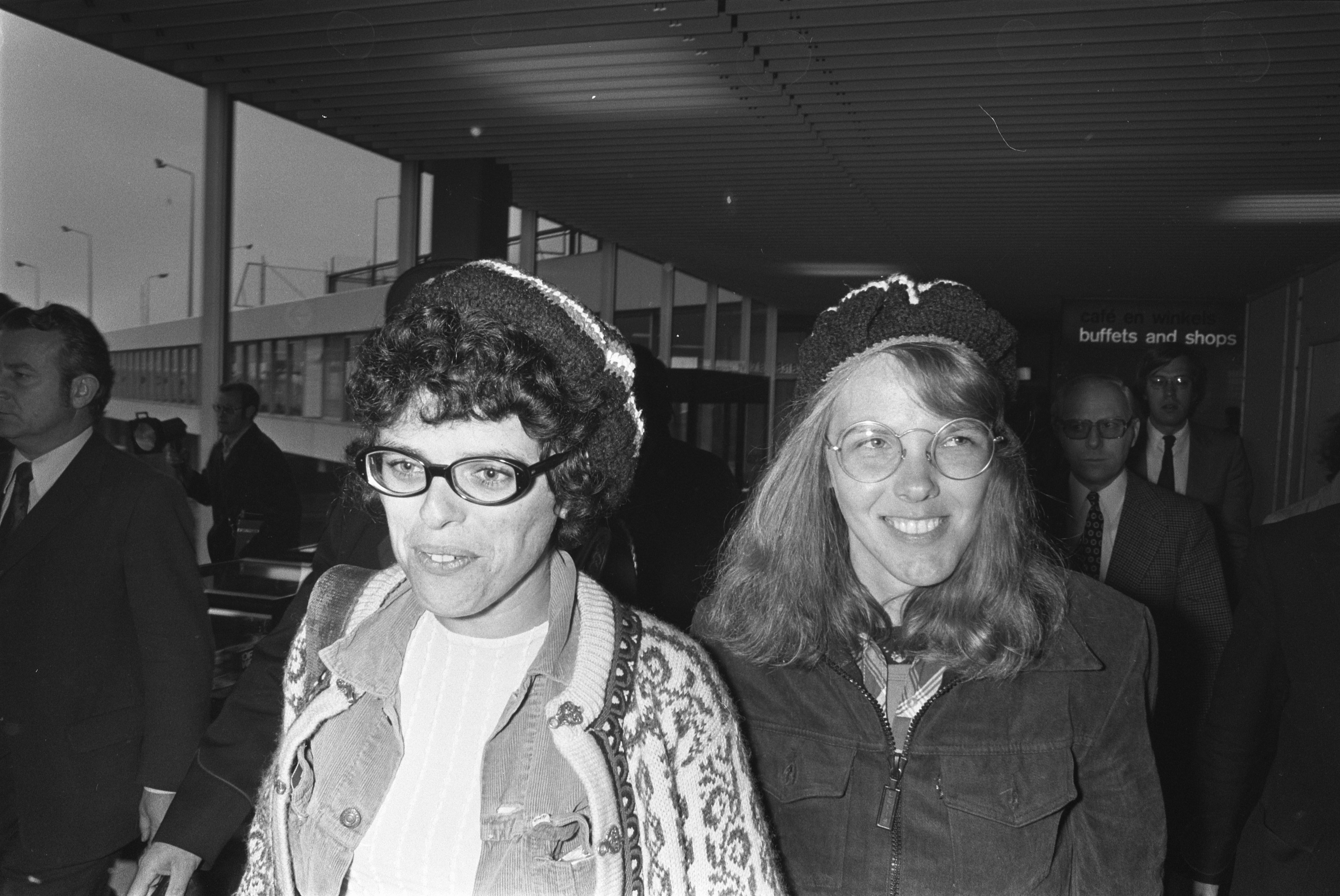 Collectie / Archief : Fotocollectie Anefo Reportage / Serie : [ onbekend ] Beschrijving : Paula Witkam (links) en Marga Heynsbroek bij aankomst Schiphol na in Israel gevangen te hebben gezeten wegens hulp aan Palestijnen Datum : 21 november 1974 Locatie : Noord-Holland, Schiphol Trefwoorden : aankomsten Persoonsnaam : Heynsbroek, Marga, Witkam, Paula Fotograaf : Bogaerts, Rob / Anefo Auteursrechthebbende : Nationaal Archief Materiaalsoort : Negatief (zwart/wit) Nummer archiefinventaris : bekijk toegang 2.24.01.05 Bestanddeelnummer : 927-5960